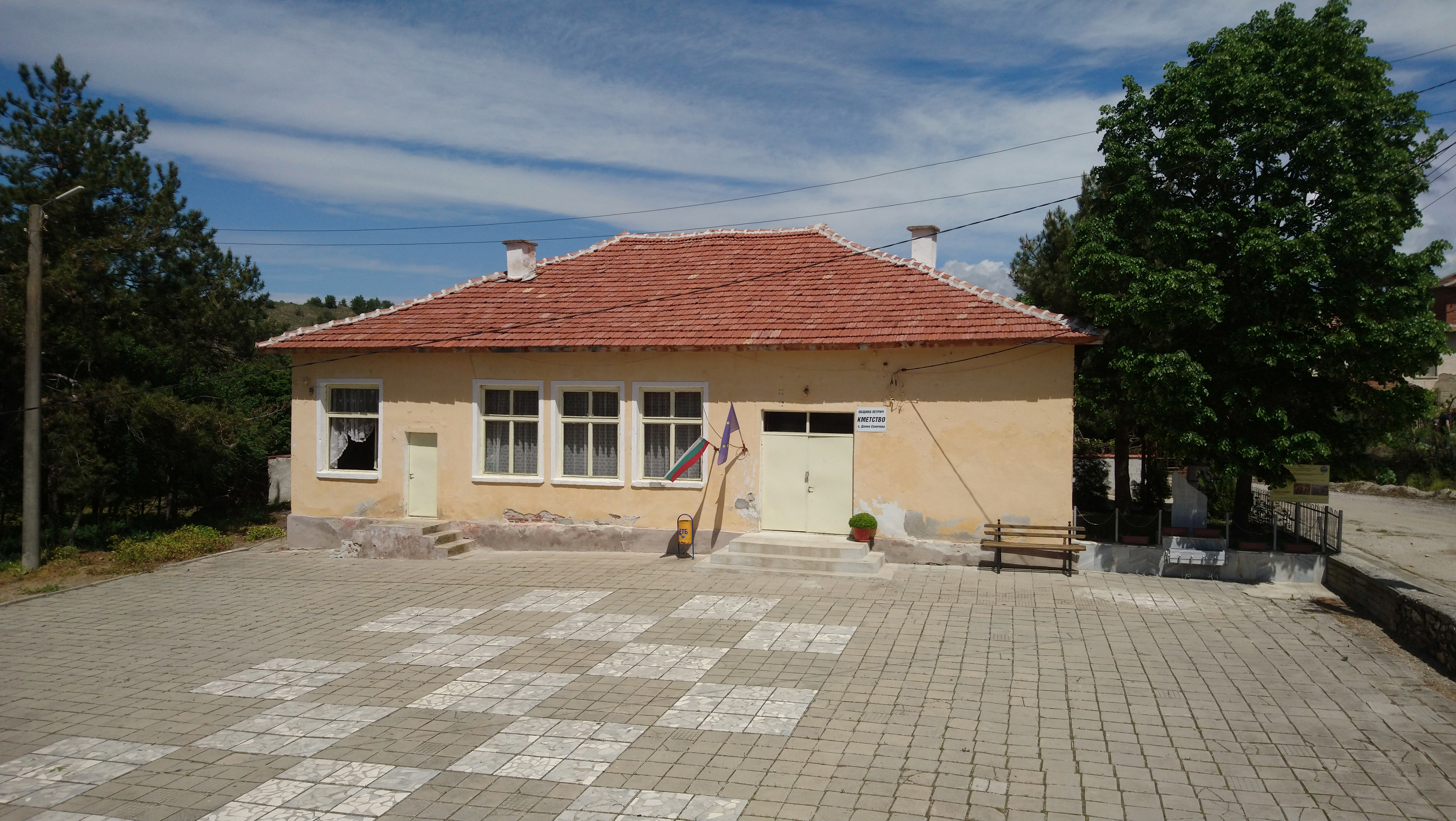 Кметството на село Долно Спанчево